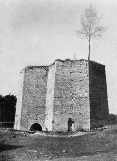 Kalksteinofen bei Klein Stein, Kreis Groß Strehlitz